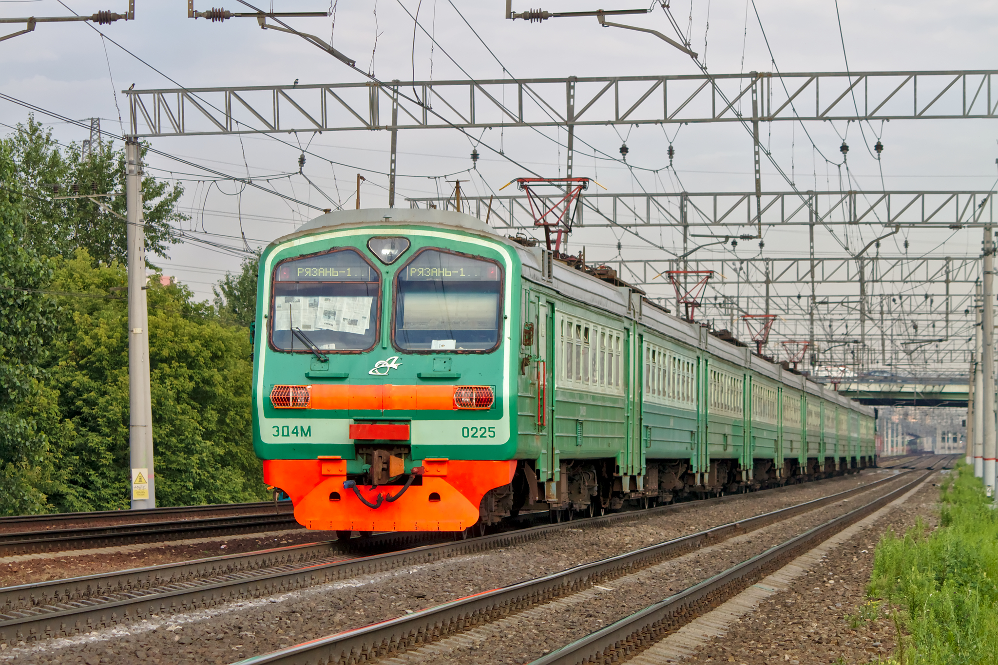 ЭД4М-0225, Люберцы-1 - Перово, Рязань - Москва, Москва. см. фото 607111 в альбоме автора